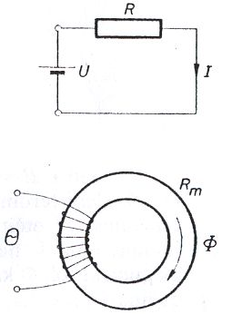 Figura 7. Analogjia e qarkut magnetik me qarkun elektrik